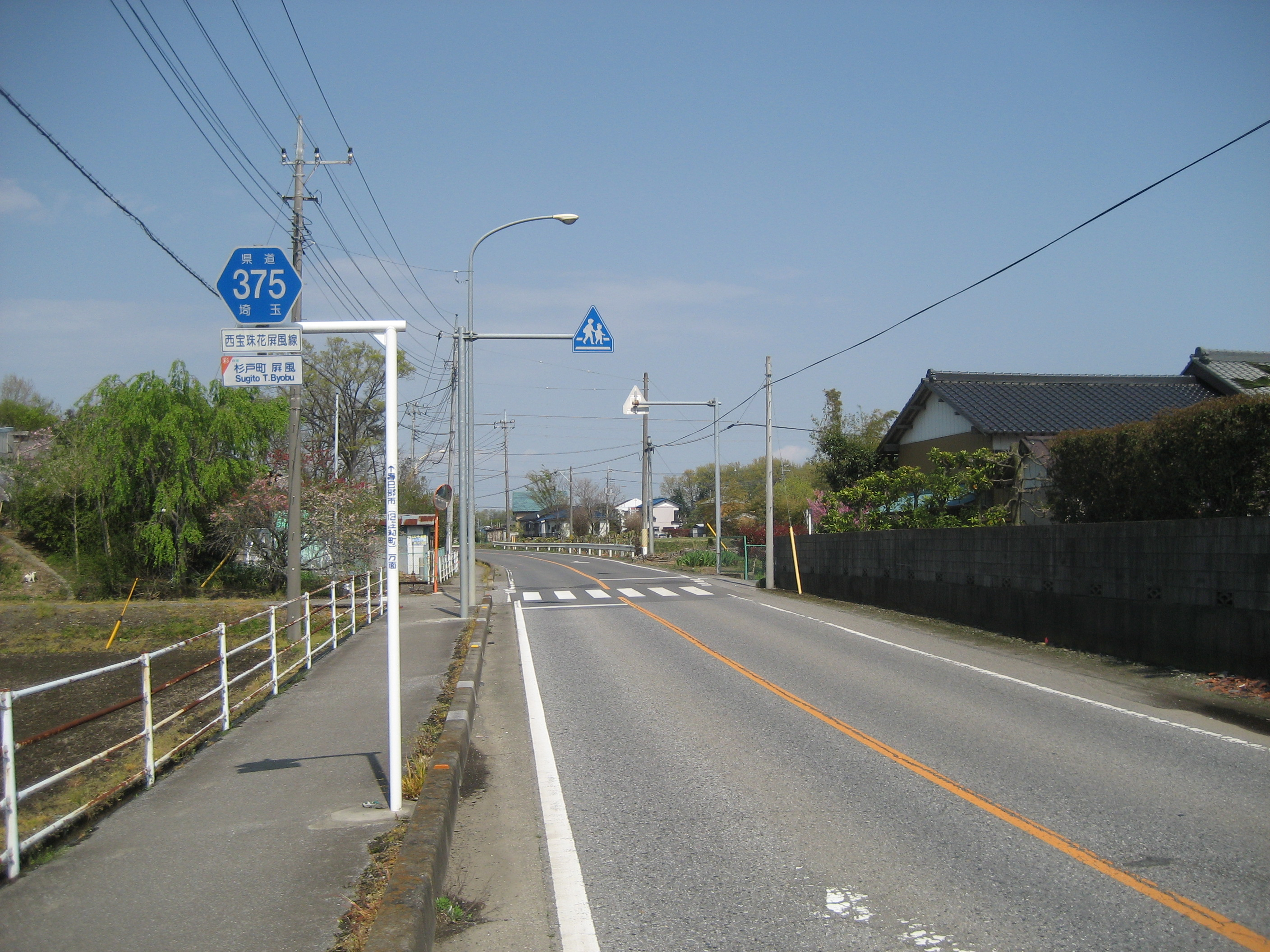 埼玉県道３７５号線杉戸町内